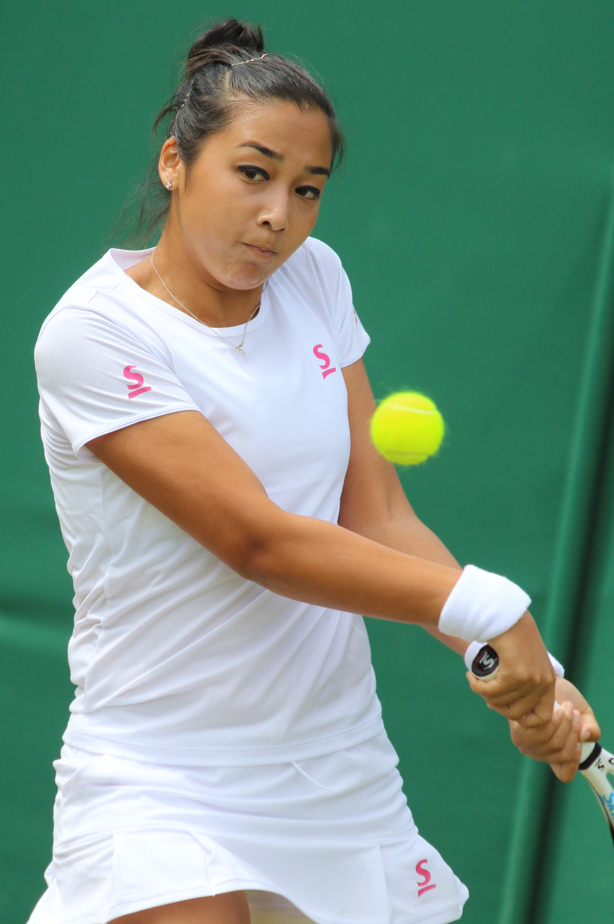 Diyas WM17 (6)